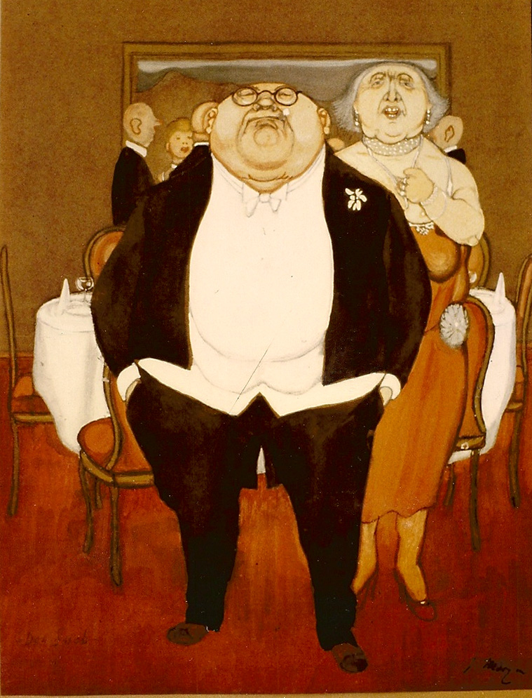 Die Neureichen, Gouache, ca. 1950